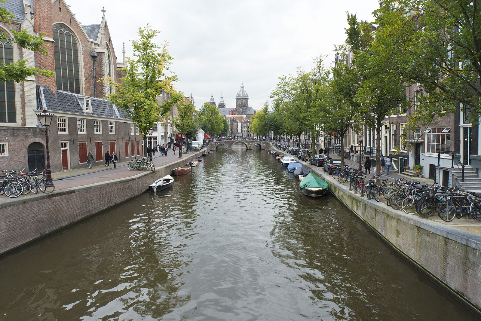 Amsterdam Canal